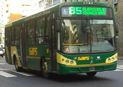 Linea 85